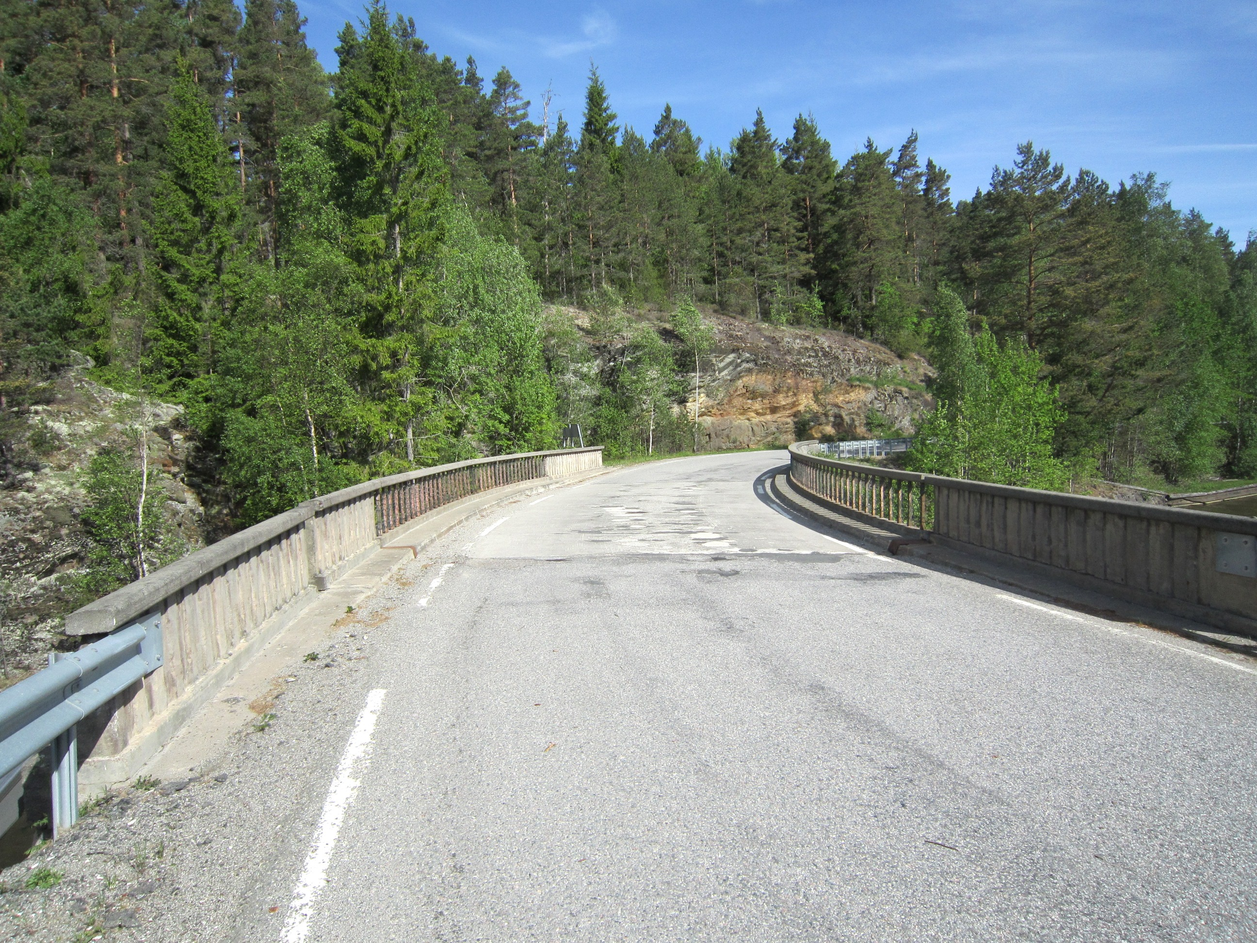 Primær fylkesvei 124 krysser Bøensfjorden (Øymarksjøen) på Fossbekk bru